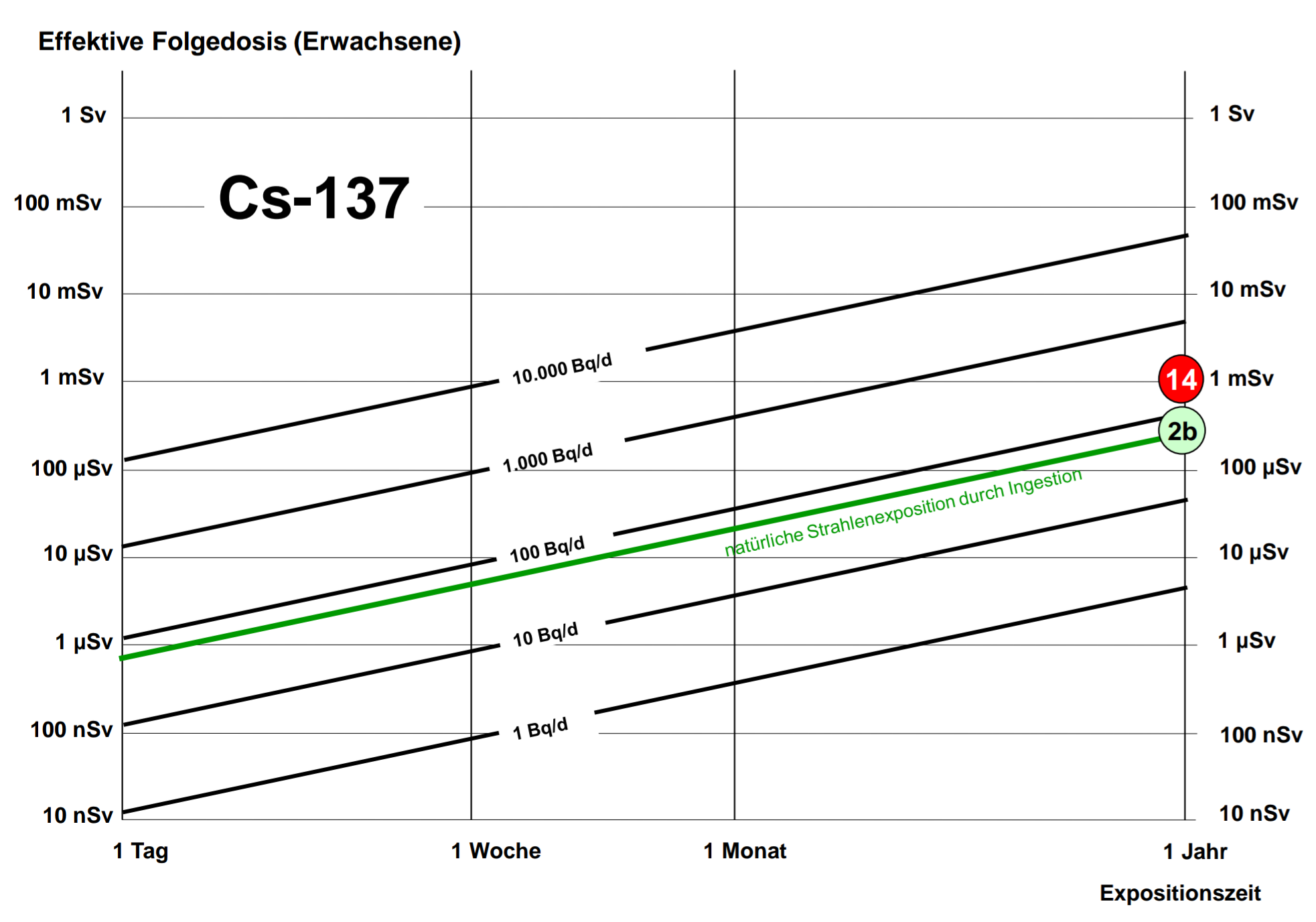 Dosisaufnahme (effektive Folgedosis) durch regelmäßige Ingestion von Cs-137 bei bekannter Aktivitätszufuhr pro Tag